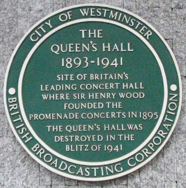 Nrf: Pliaque à Londres